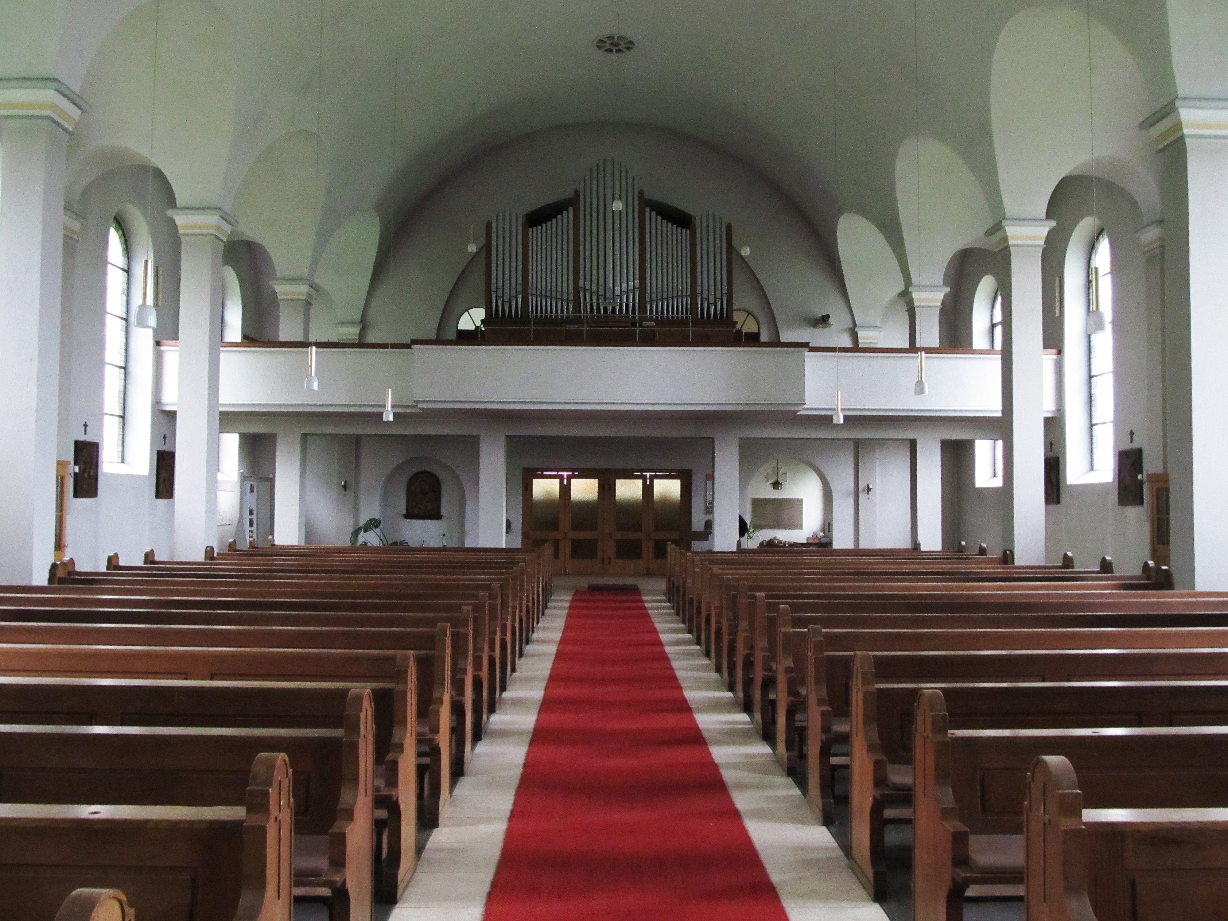 Blick ins Innere der katholischen Pfarrkirche St. Laurentius in Eschringen, einem Stadtteil der saarländischen Landeshauptstadt Saarbrücken